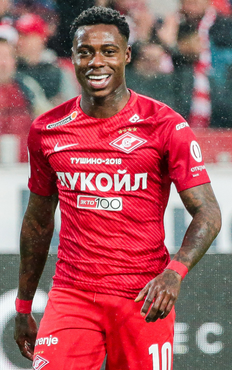 «Спартак» покинул розыгрыш Кубка России